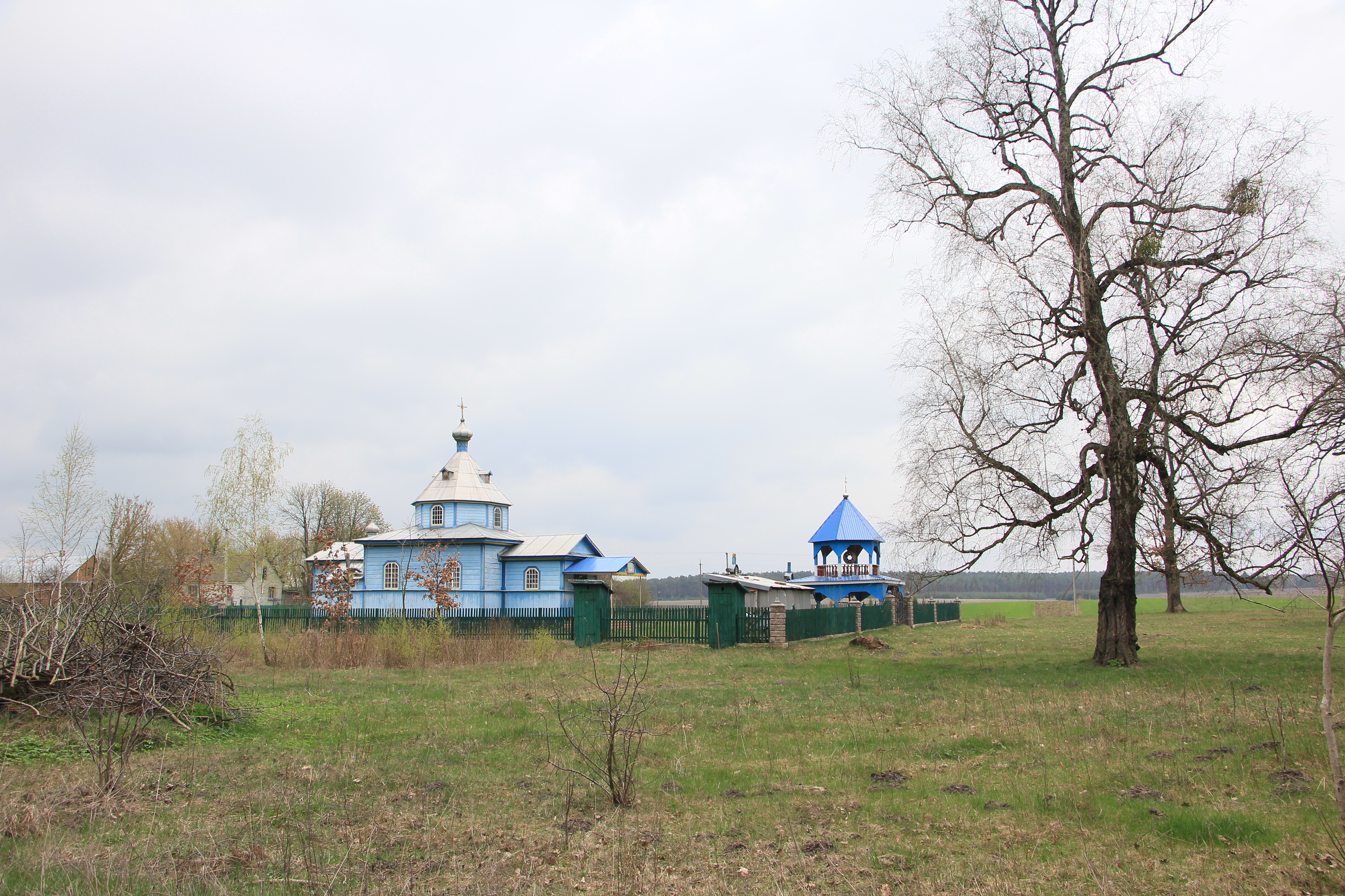 Дерев'яна церква в селі Хотівка Кременецького району Тернопільської області